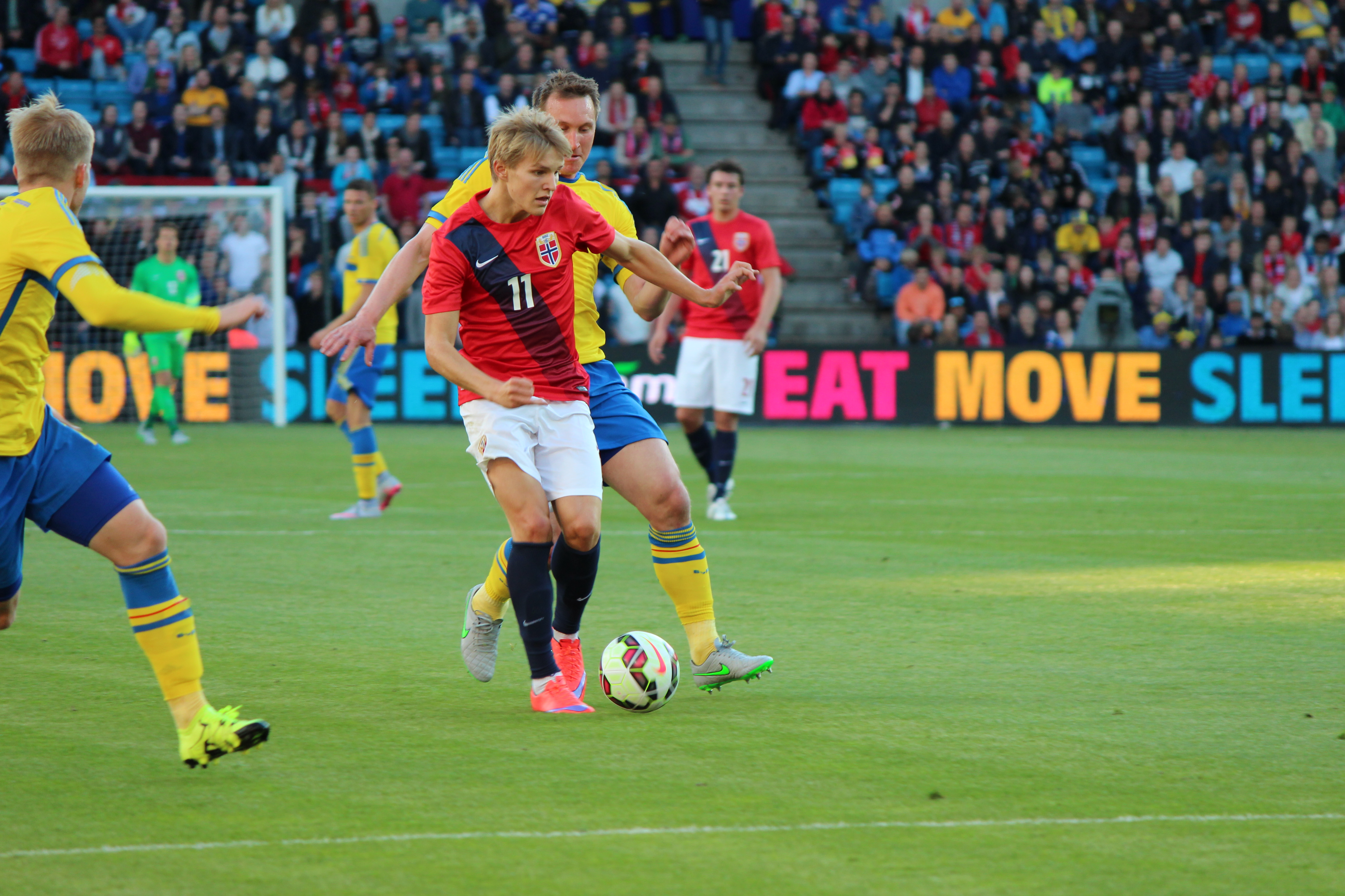 Martin Ødegaard spilte 90 minutter da Norge-Sverige møttes til dyst i privatlandskamp på Ullevaal stadion 8. juni. Kampen endte 0-0.